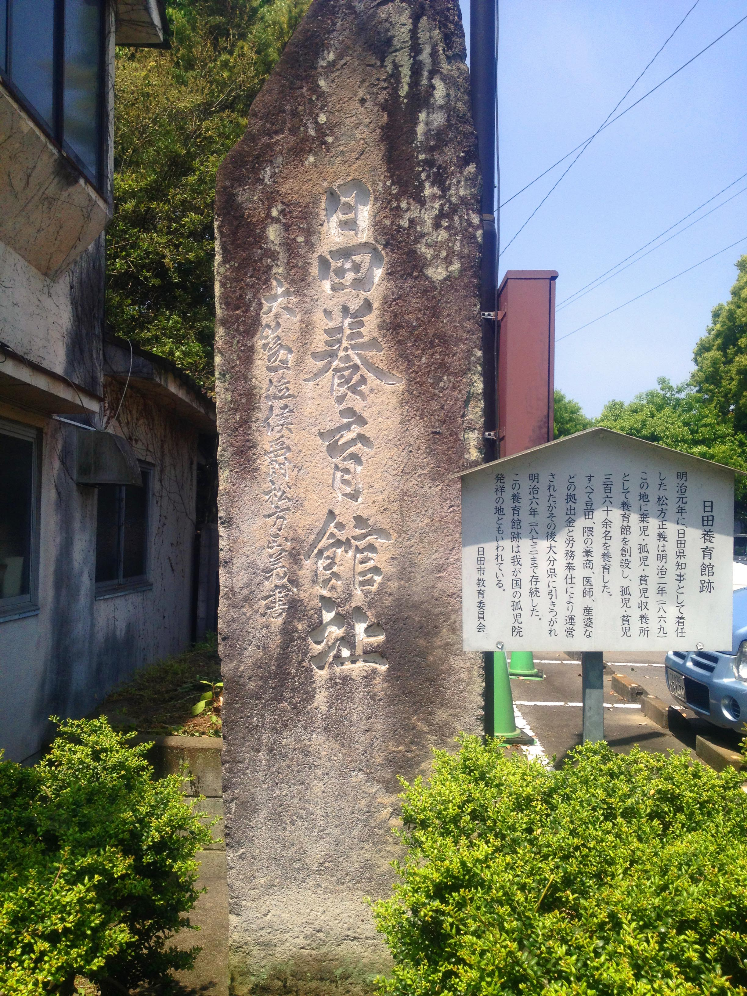 日田養育館跡にある石碑。碑文は松方正義による。 日田養育館は、現在の日田市営三本松駐車場（大分県日田市三本松1丁目14−30）にあたる場所にあった。